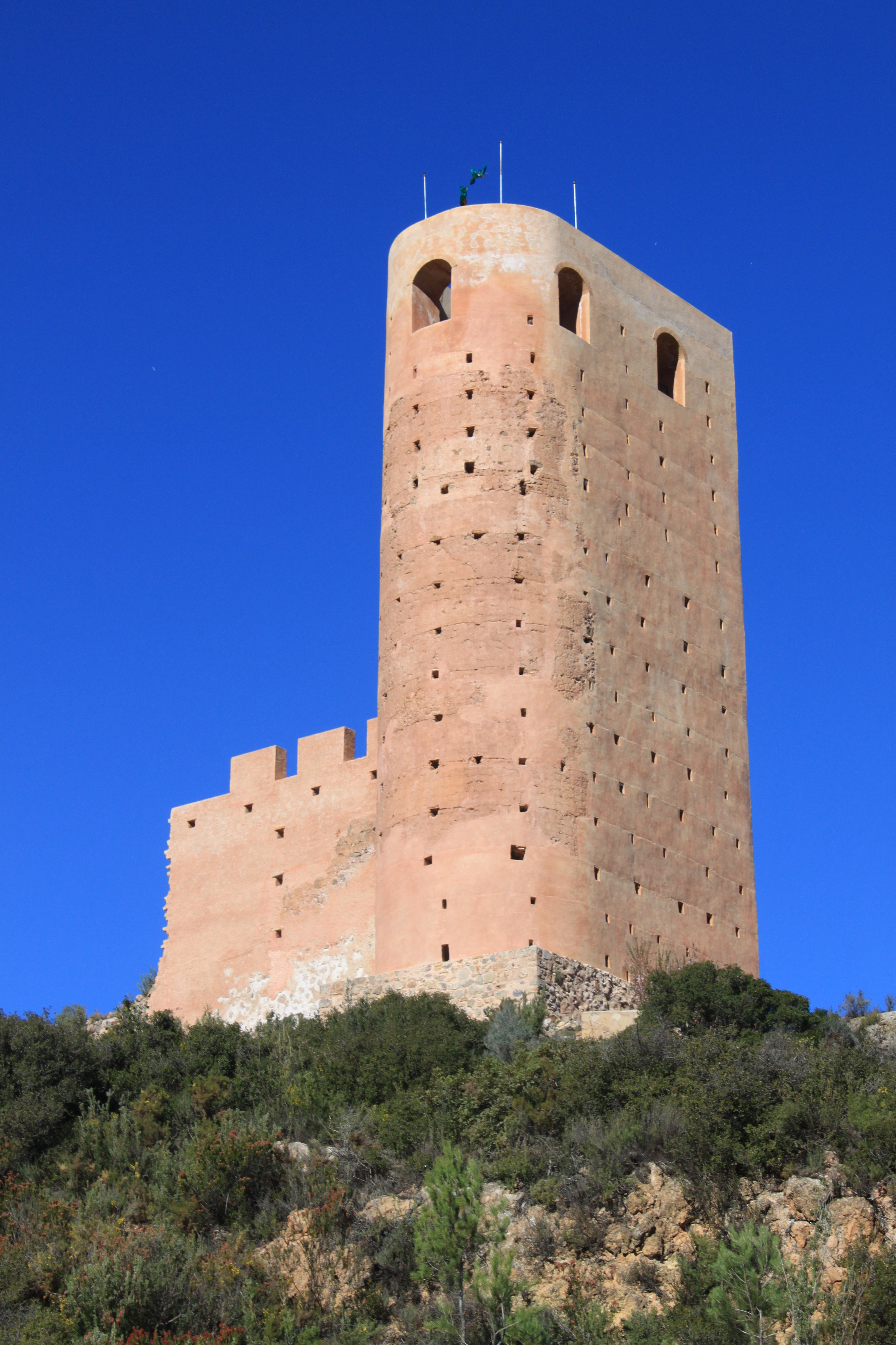 Torre del homenaje del Castillo de Almonecir, Vall de Almonacid, provincia de Castellón, Comunidad valenciana, España.